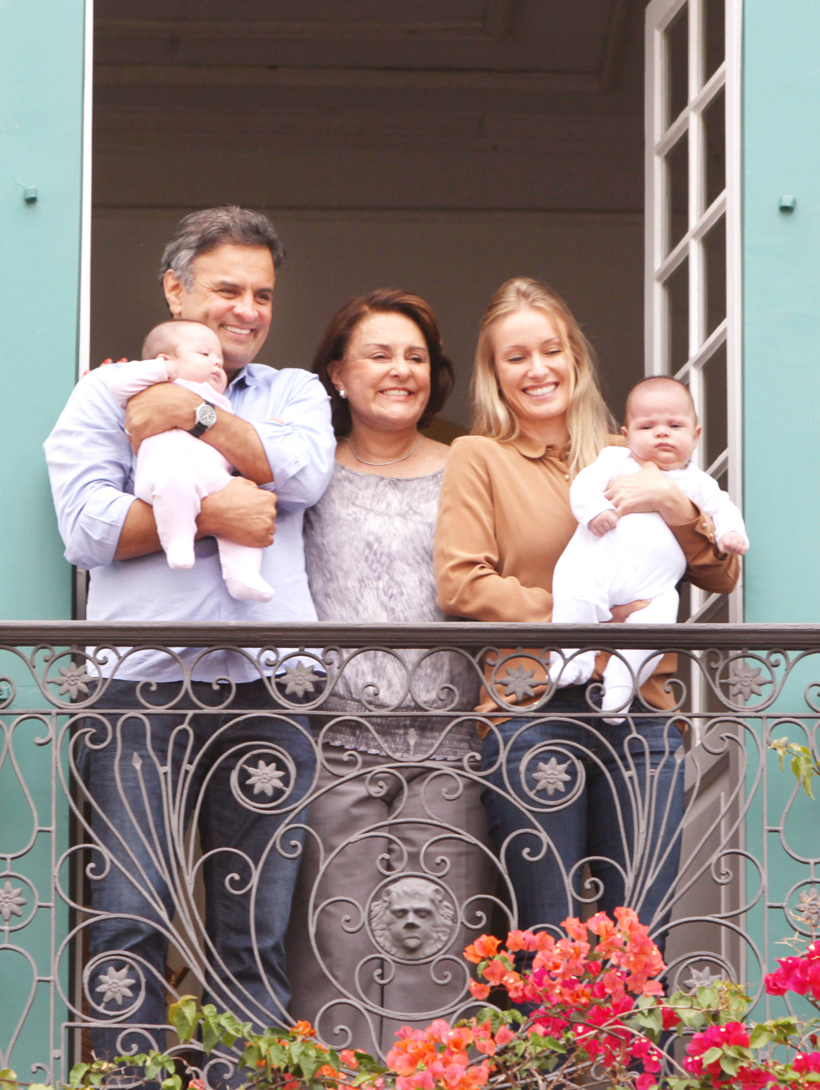 Aécio Neves com sua mãe, filhos e esposa em 25 de outubro de 2014.